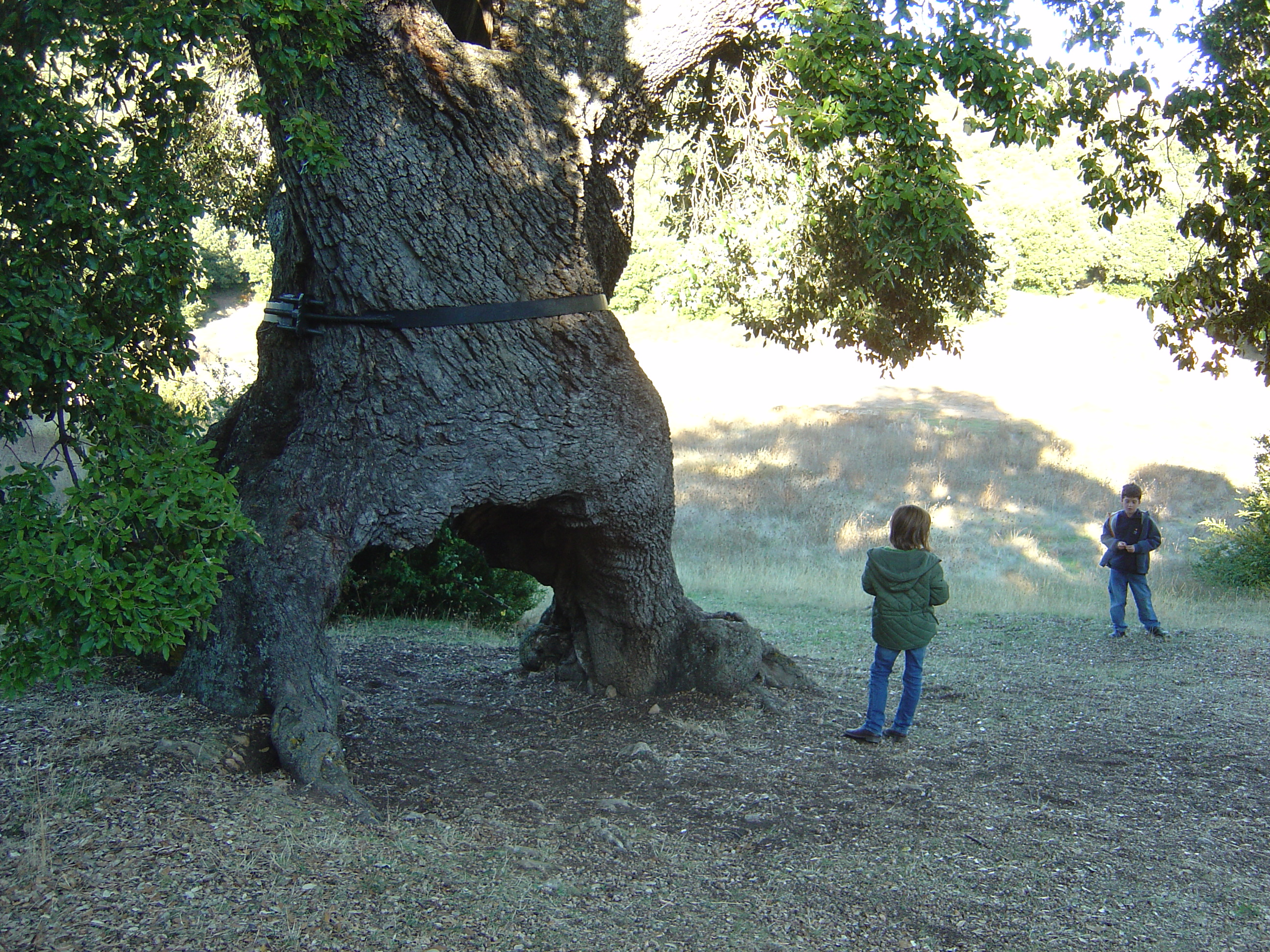 Encina Tres Patas. Mendaza. Navarra. Spain